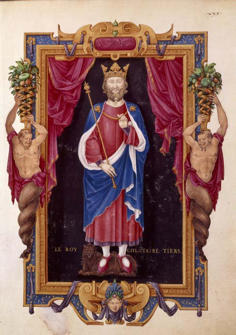 Le roy Chlotaire Tiers selon Jean Du Tillet, Recueil des rois de France, 1566 (fr. 2848, f°30). Bibliothèque nationale de France. A ses pieds, un lion.